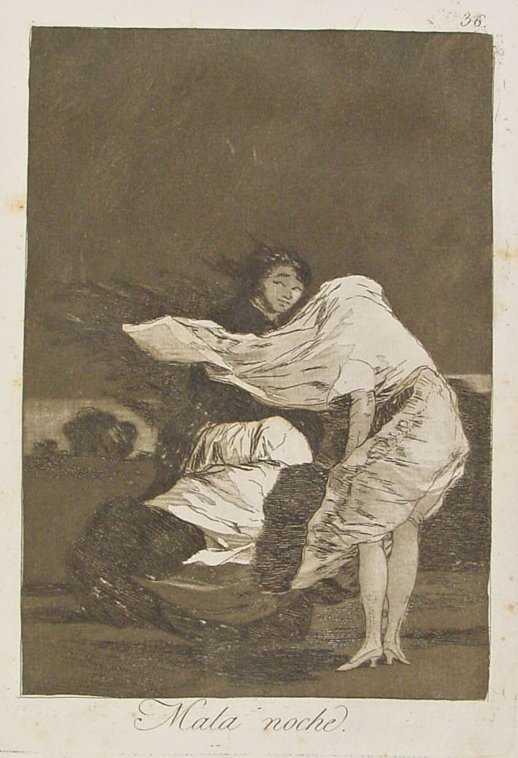 Capricho nº 36: ' de Goya, serie Los Caprichos